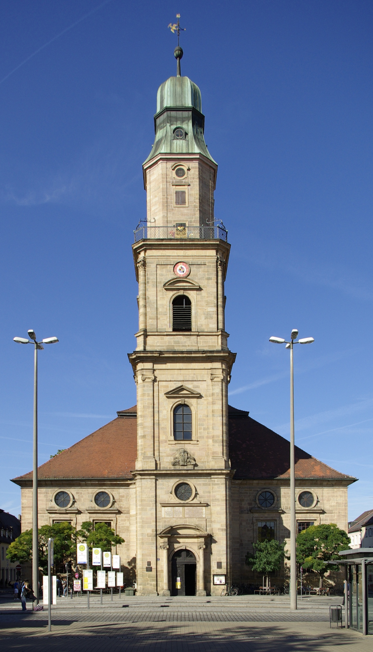 Hugenottenkirche in Erlangen